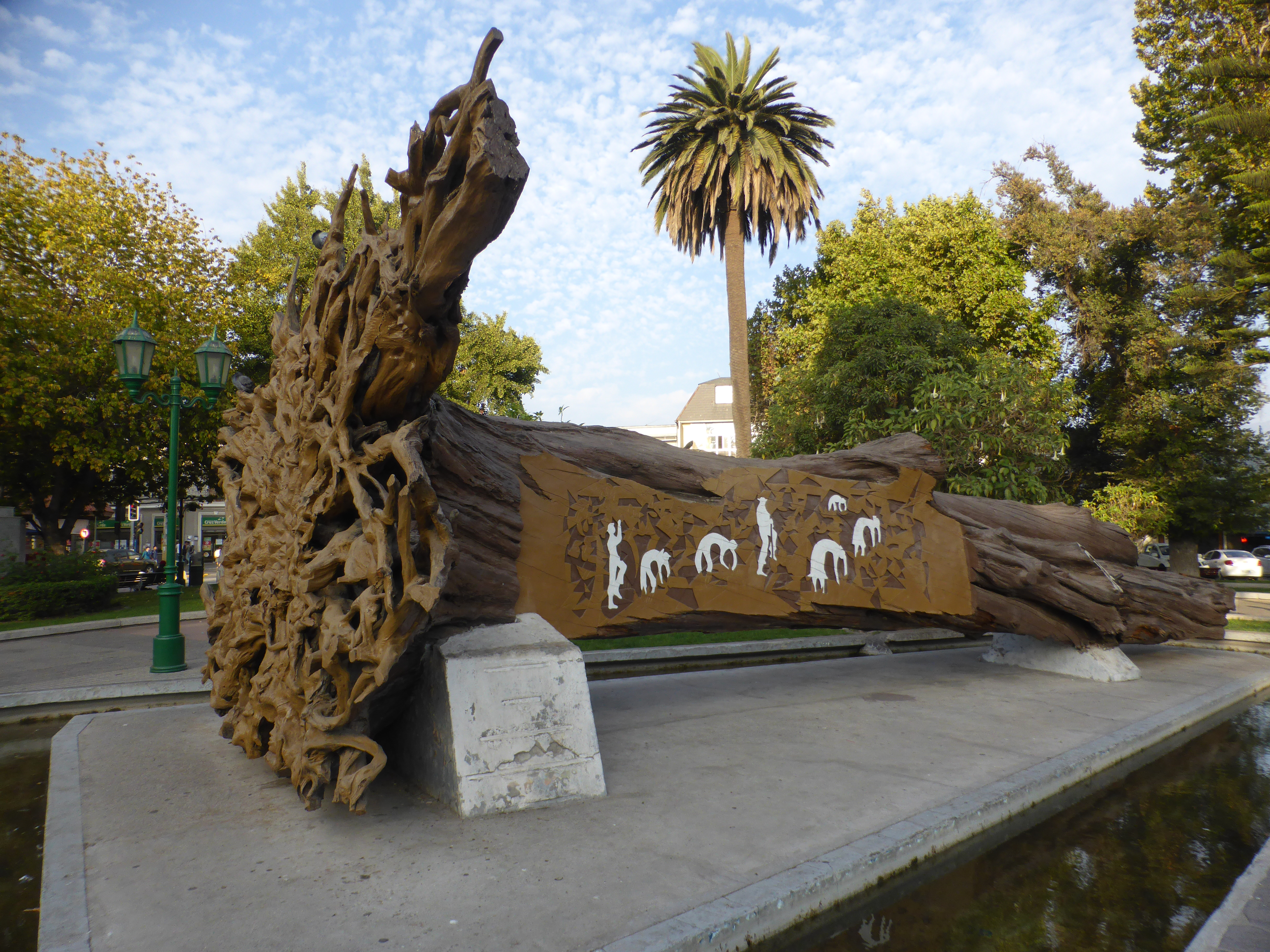 Gran ciprés caído por un temporal. Tallado y convertido en monumento. Plaza de Armas de Quillota.